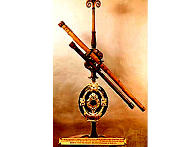 הטלסקופ הראשון של גלילאו, הטלסקופ הראשון בעולם